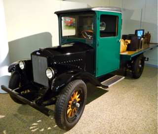 Tidig lastbil från Volvo, Volvo Museum, Göteborg